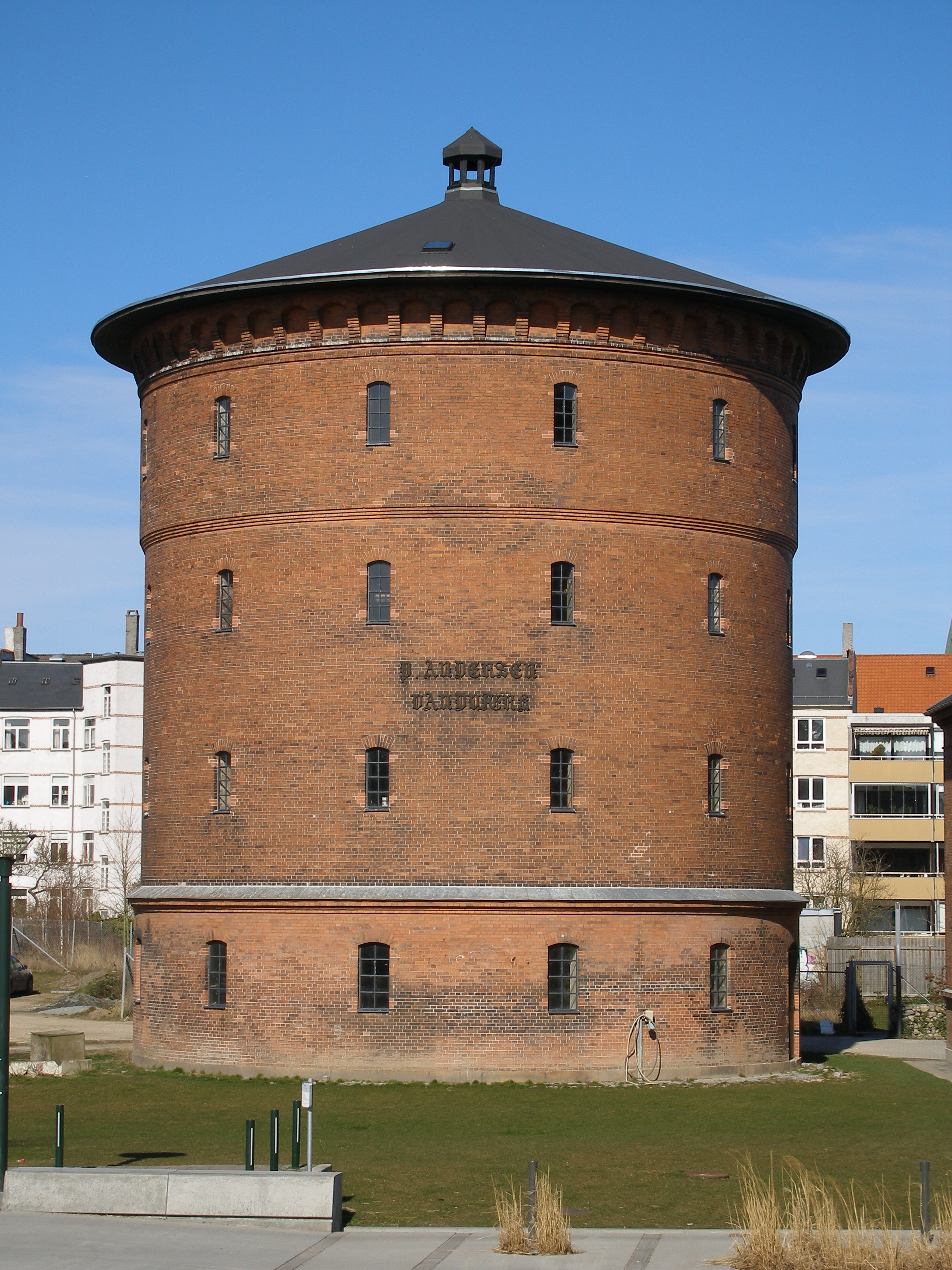 Water tower P. Andersens Vandtårn, P. Andersens Vej, Frederiksberg